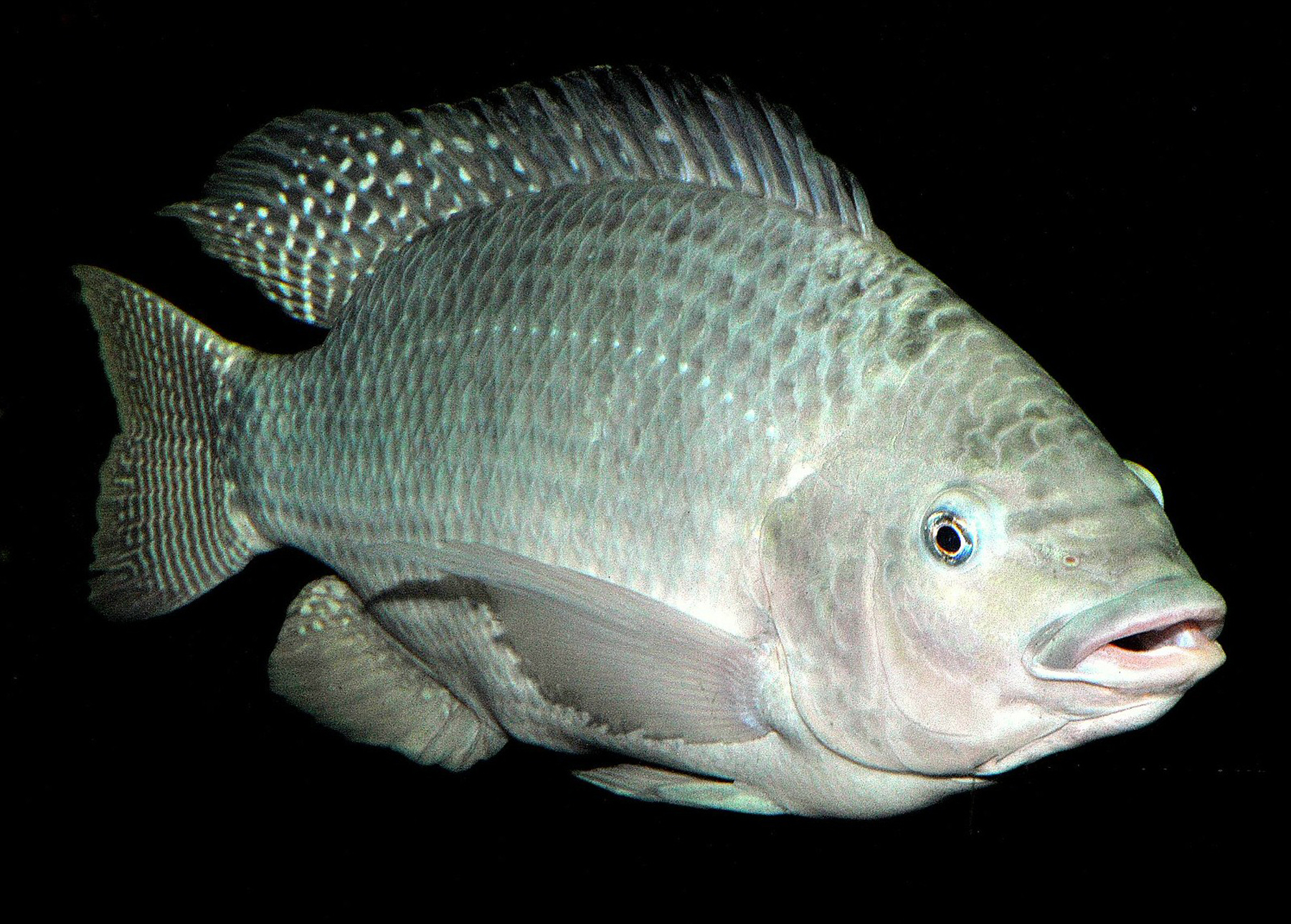 Ciclídeo originário do Rio Nilo